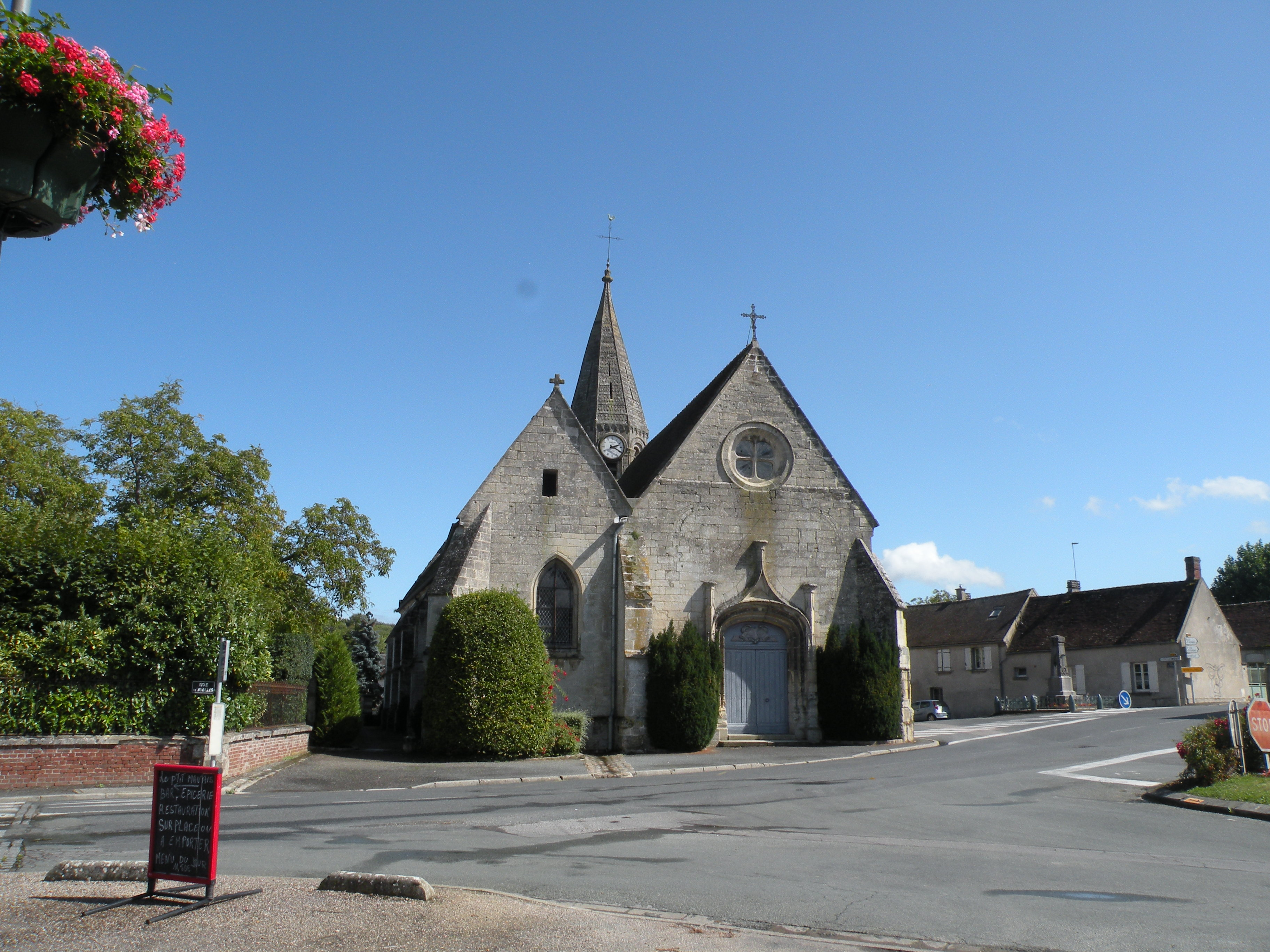 eglise de Cauvigny